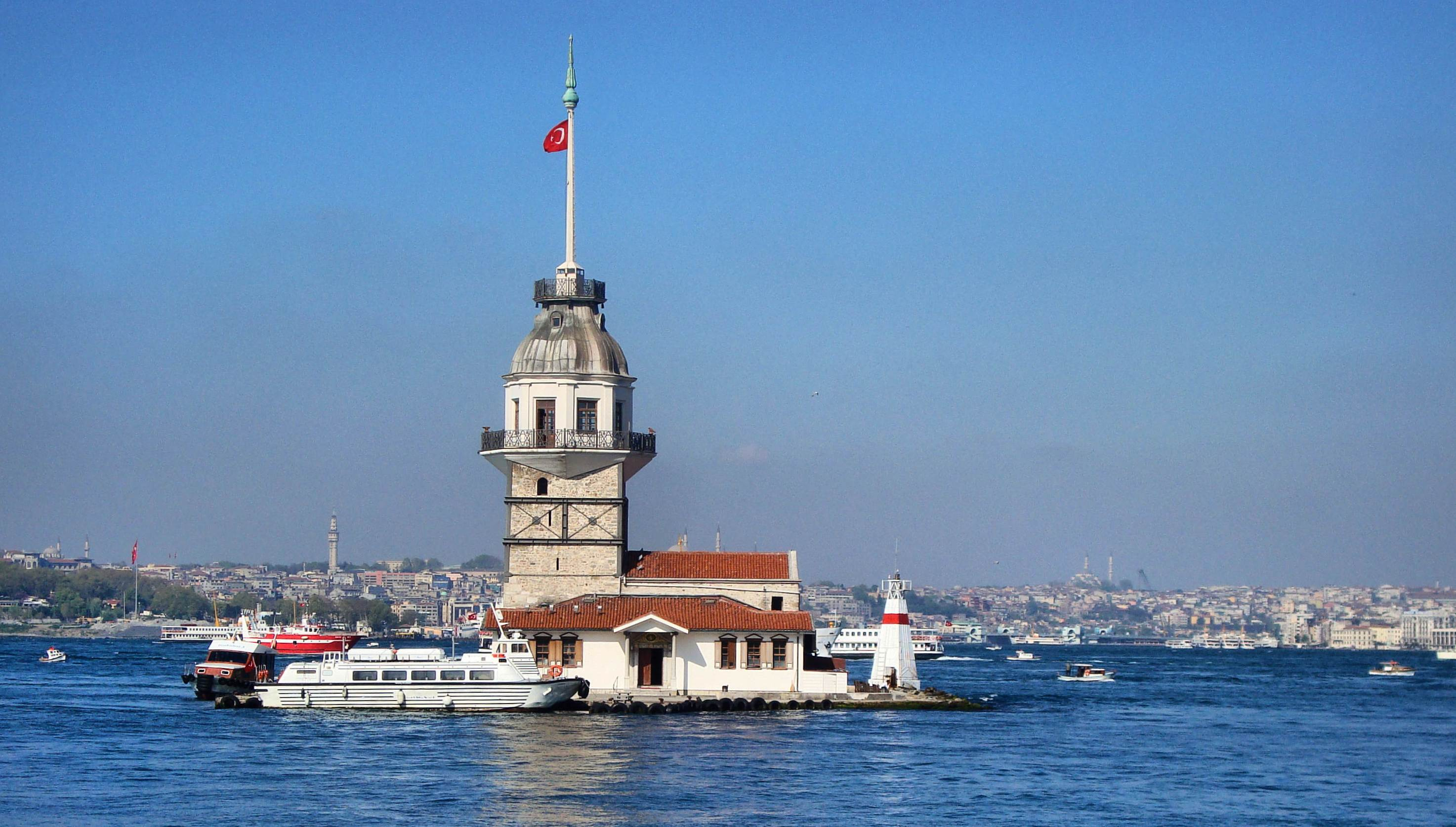 Maiden Tower - İSTANBUL